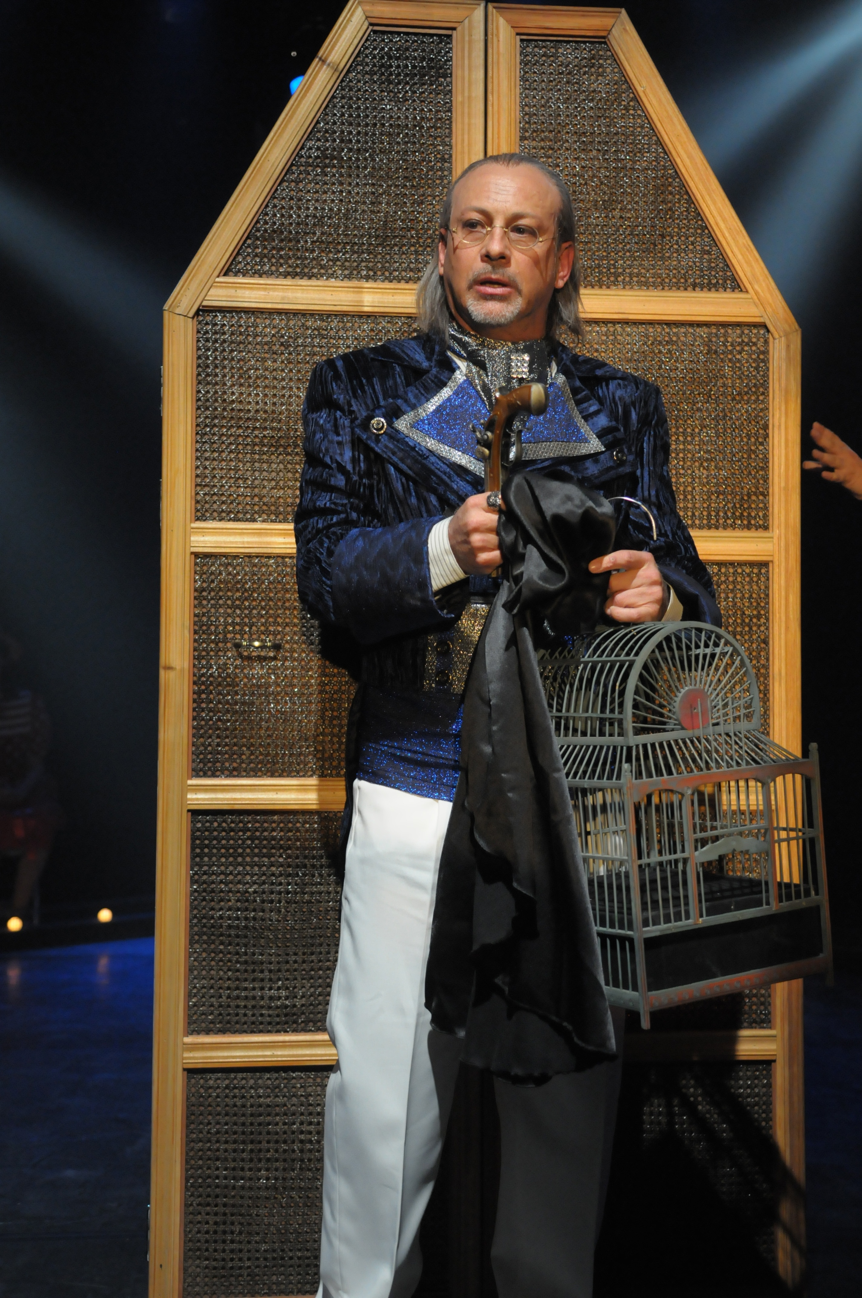 ארז שפריר בהצגה הקסם הגדול